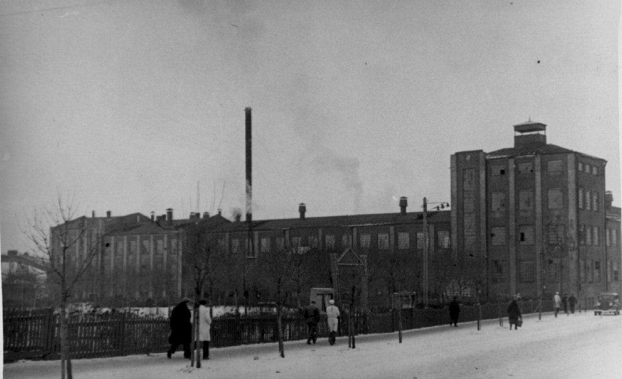 Беларуская (тарашкевіца): Менск (Miensk), Тры Карчмы (Try Karčmy). Фабрыка Камунарка